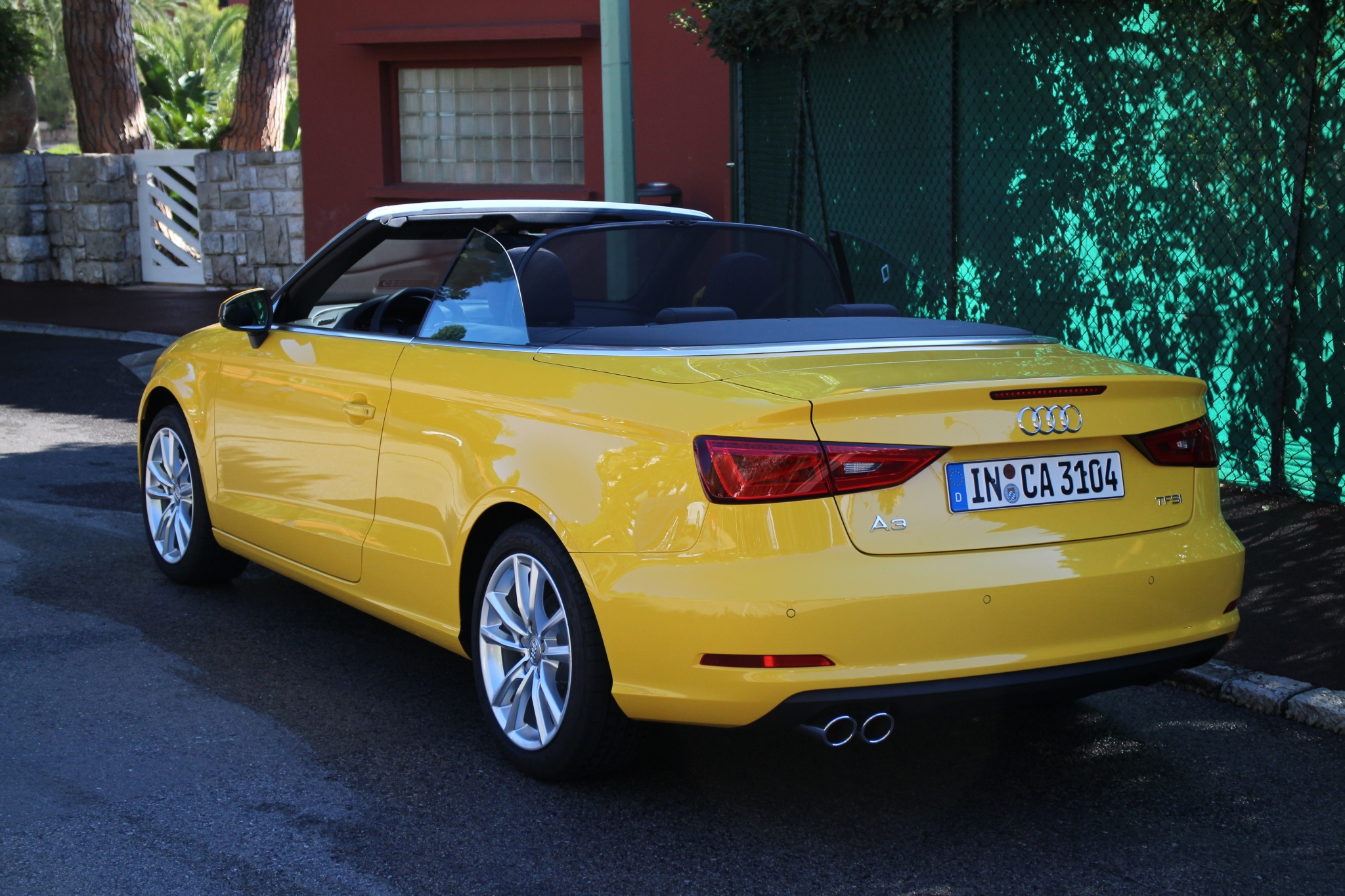 Audi A3 Cabrio 2013